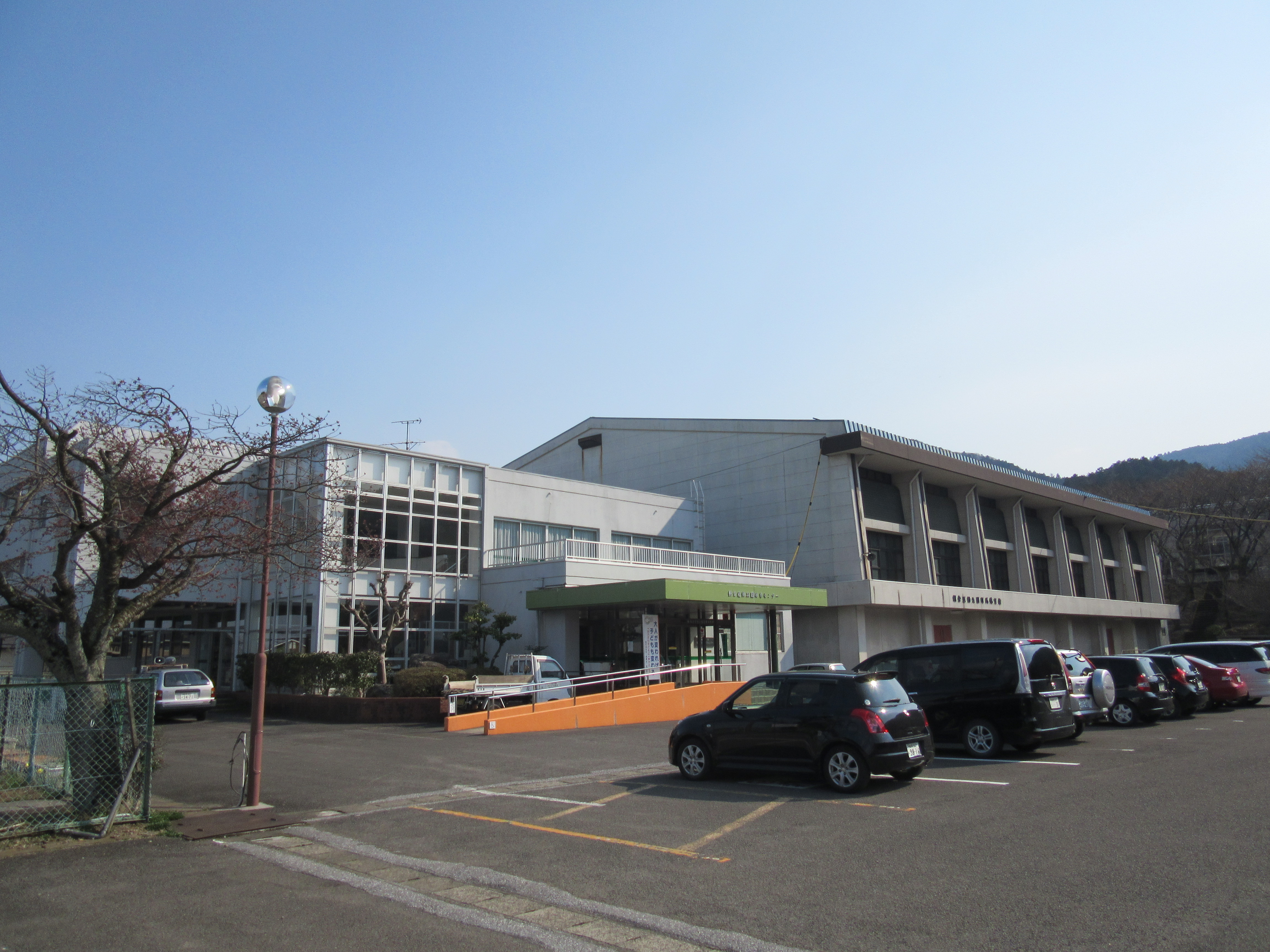 垂井町町民体育館